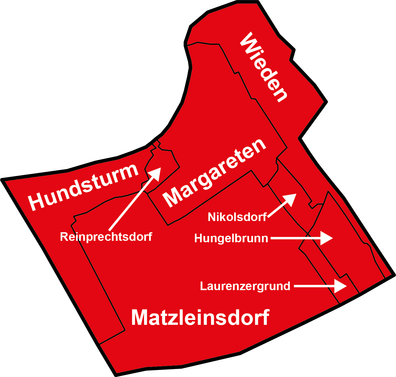 Bezirksteile von Margareten